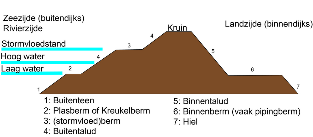 Schema van de verschillende begrippen bij een dwarsprofiel van een dijk